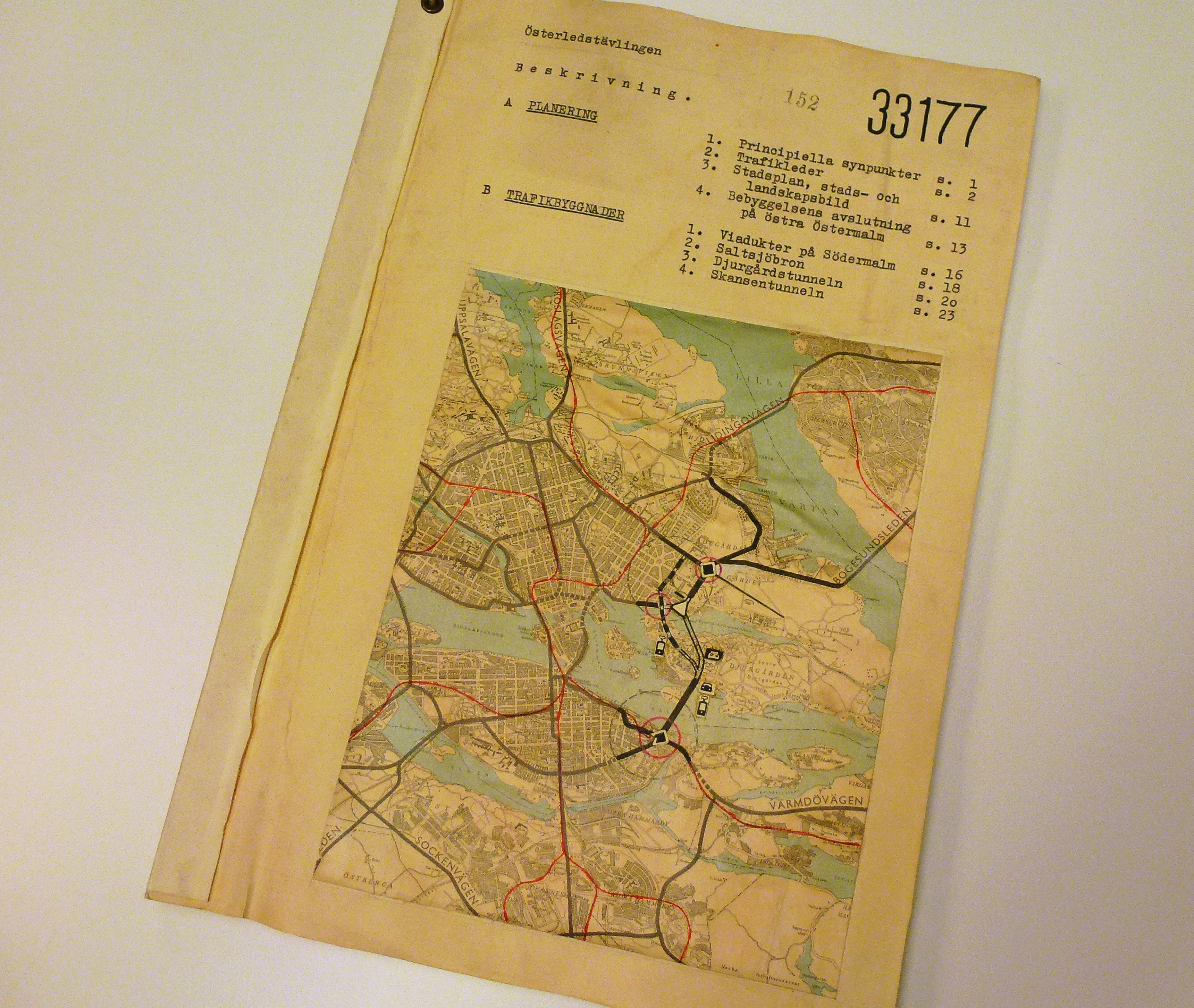 Stockholms stadsarkiv ritningsarkiv, Österledstävlingen